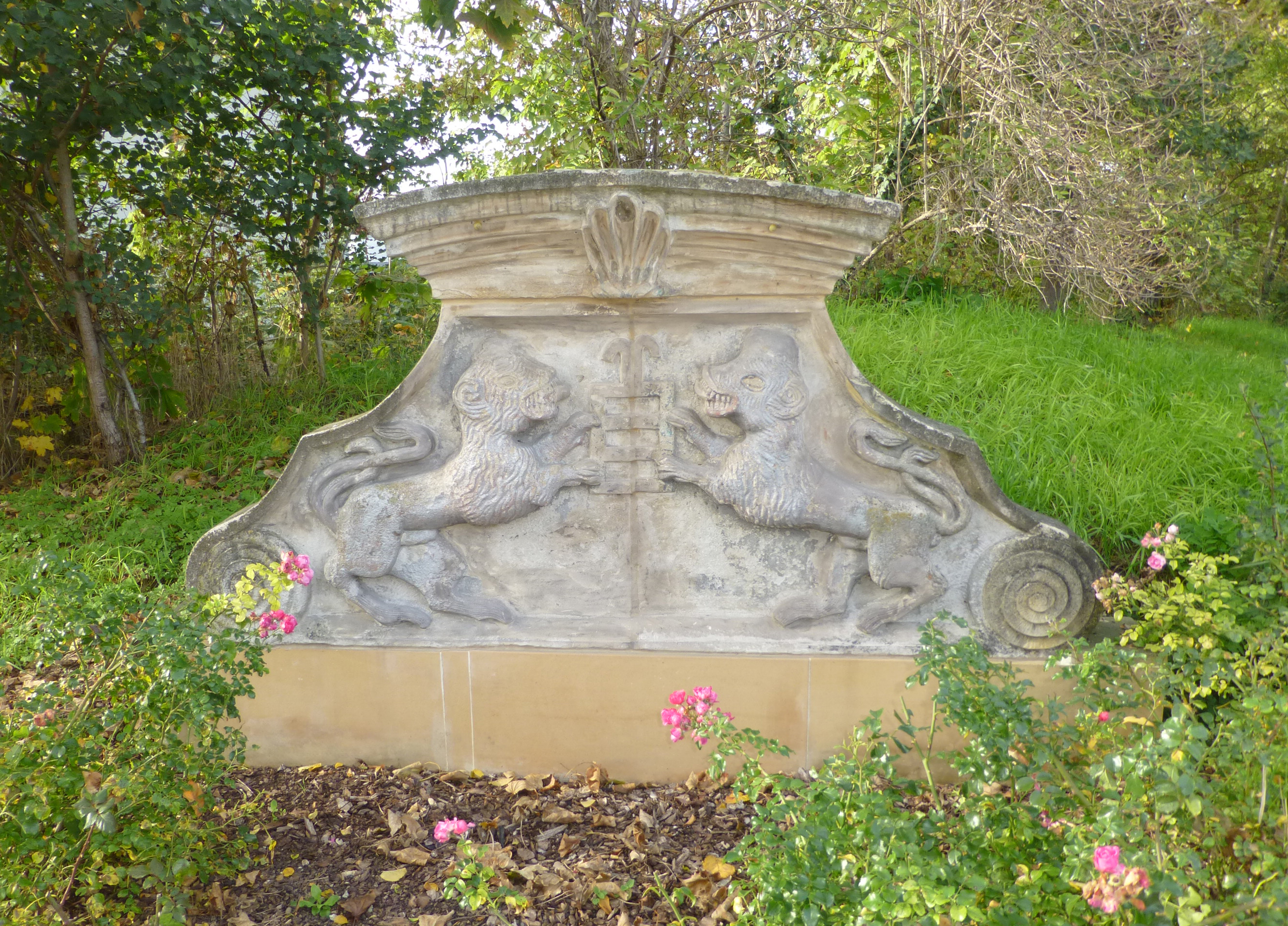 Fronton supérieur de la Fontaine à 9 bouches à Wörrstadt, district Alzey-Worms. Déposé en 1779. Armoiries de Wörrstadt.